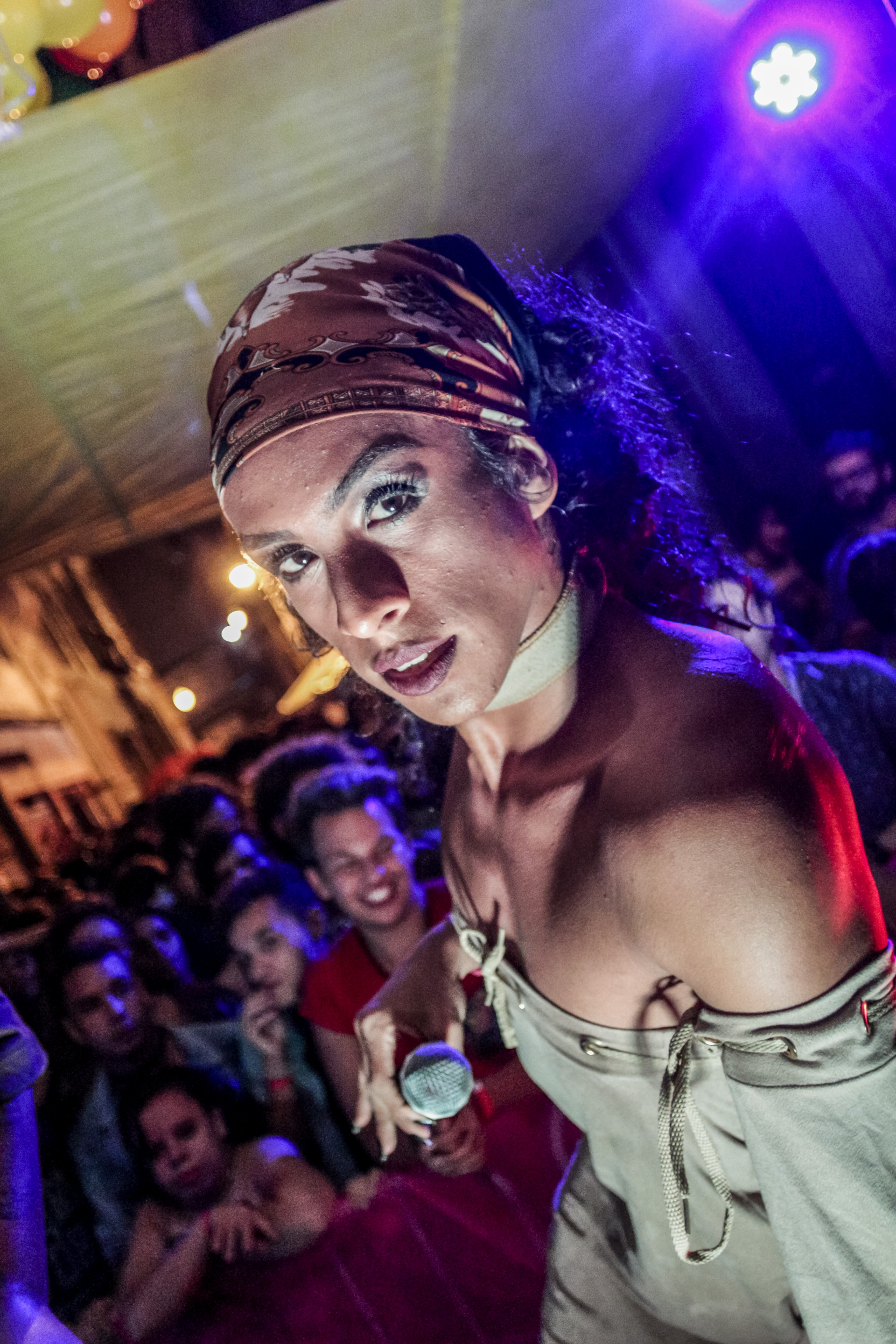 Linn da Quebrada durante o evento "Cisheterofobia Existe - A FESTA - MC Linn da Quebrada & MC Carol" no dia 1º de abril de 2017 - (RJ). Brasil.